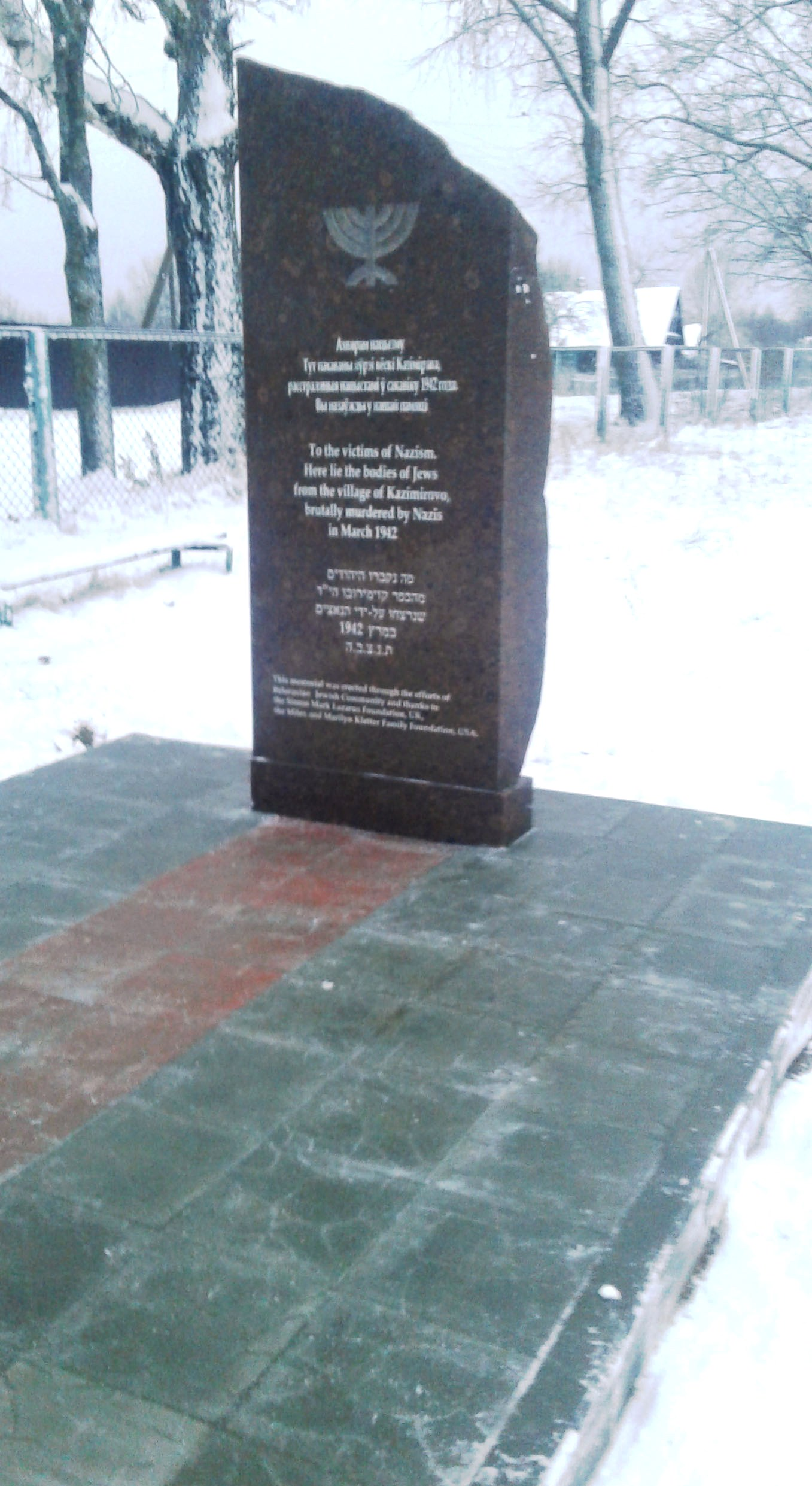 Памятник евреям деревни Казимирово Полотовского сельсовета Полоцкого района, убитым нацистами в марте 1942 года.